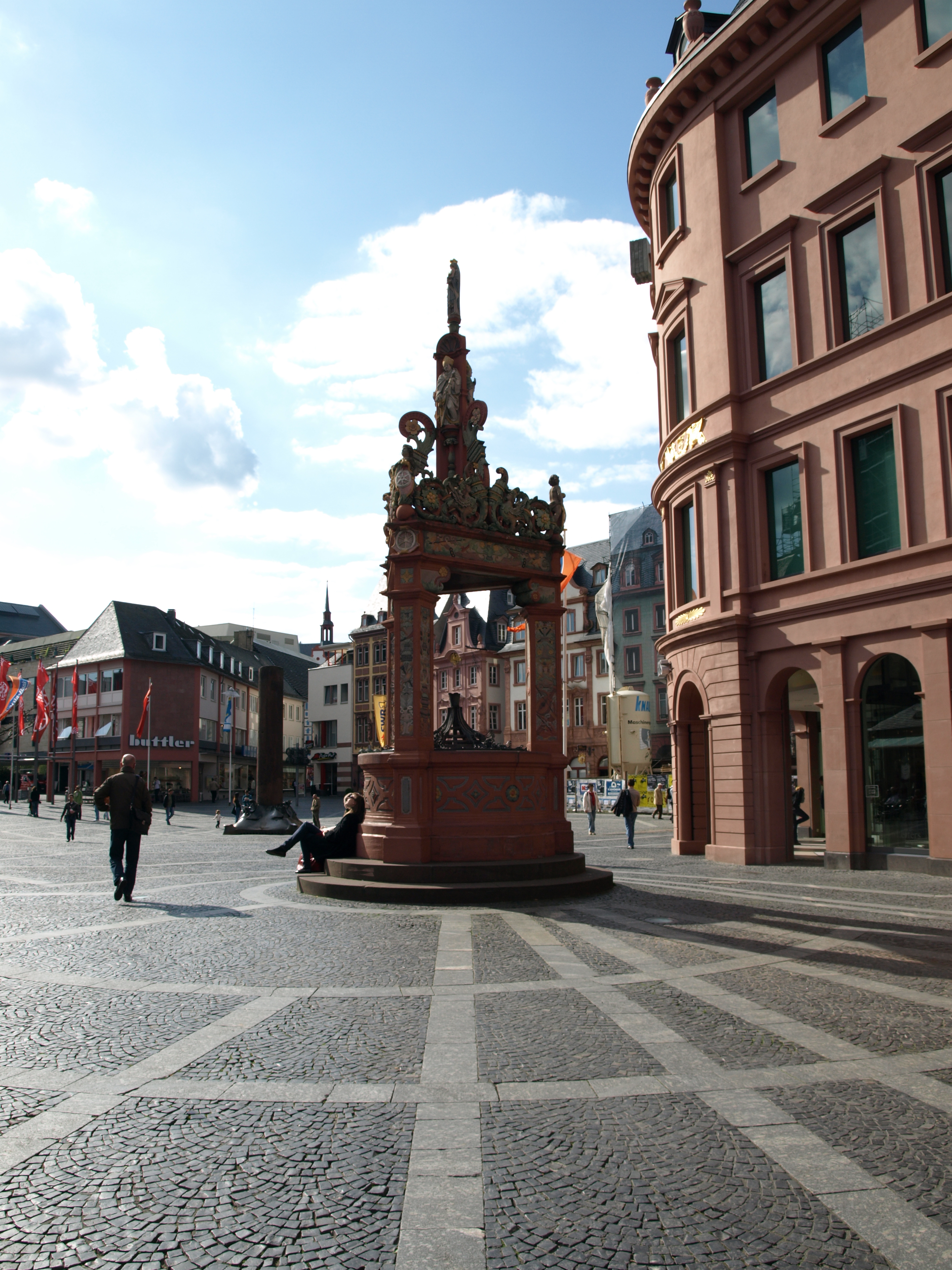 Der Mainzer Marktbrunnen